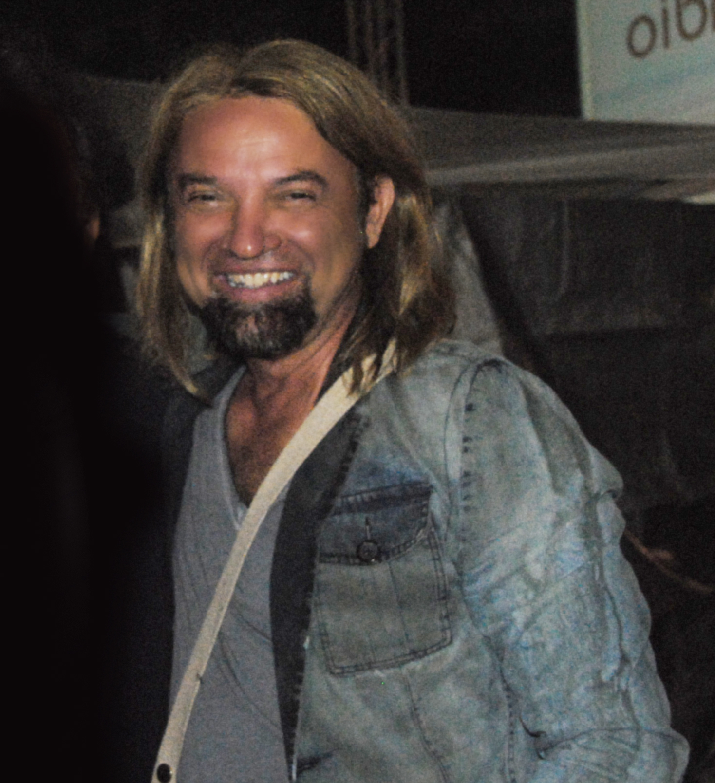 Lorenzo Piani nel back stage di un concerto- estate 2012